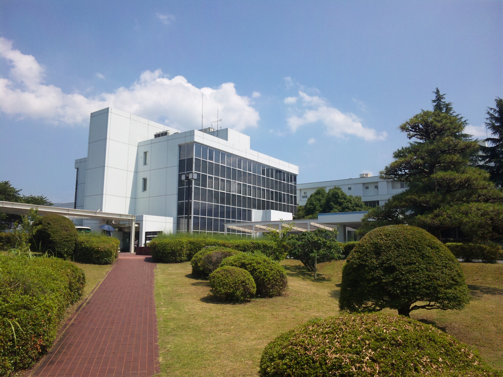 NTT東日本伊豆病院外来棟